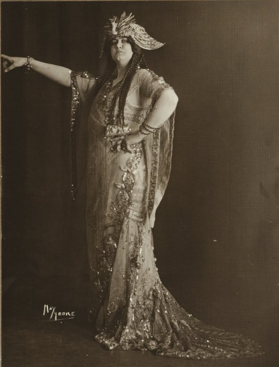 Eleonora de Cisneros, American contralto, as Amneris in Aida, Sydney, 1911 May Moore.